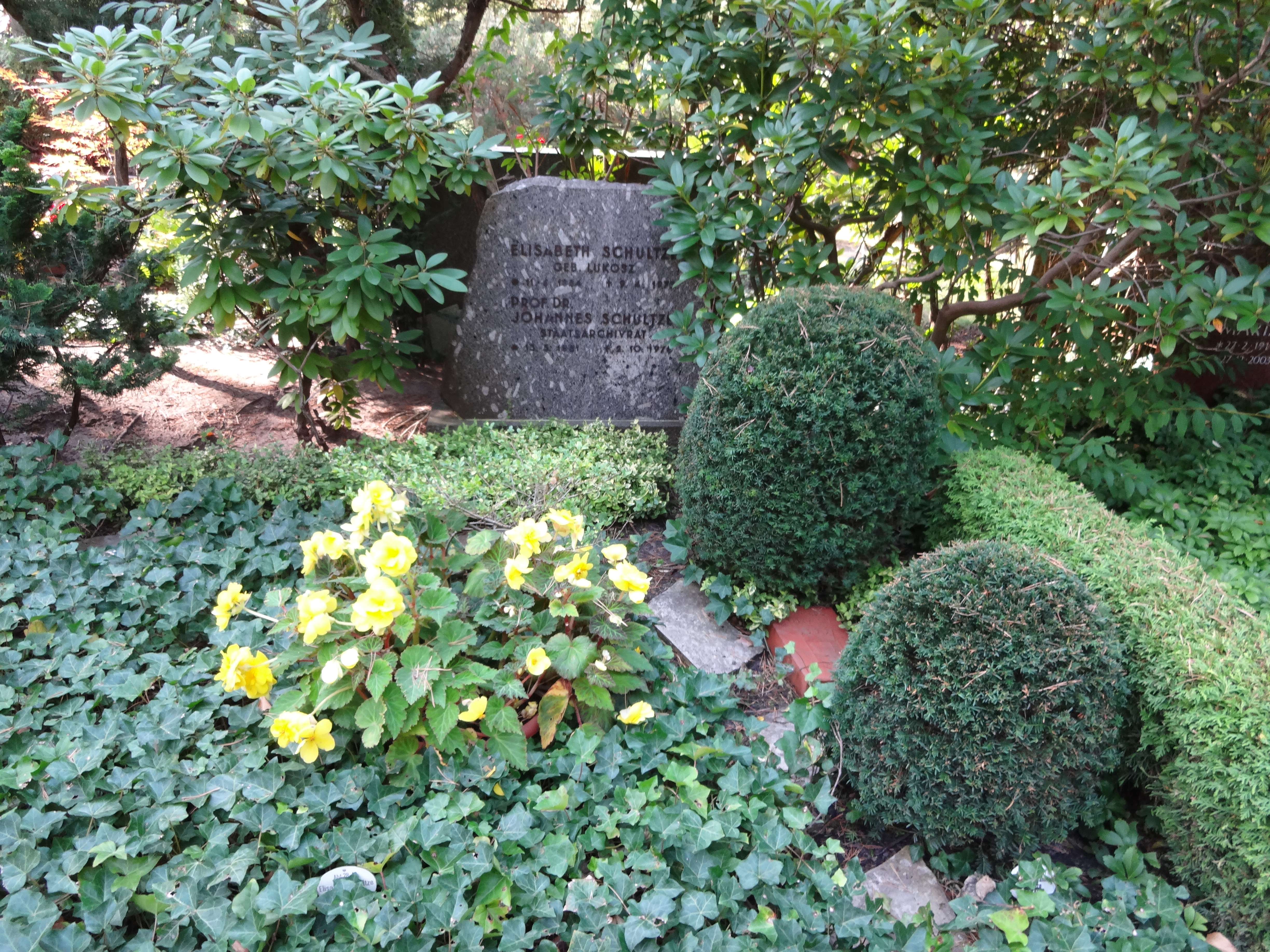 Ehrengrab für Schultze, Johannes auf dem Waldfriedhof Dahlem; der Friedhof ist ein Gartendenkmal in BerlinThis is a photograph of an architectural monument.